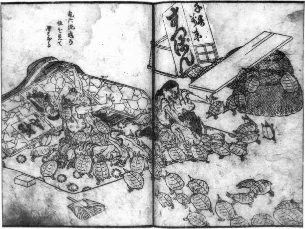 Suppon no Kaii (すっぽんの怪異) from Hokuetsu-Kidan (北越奇談)